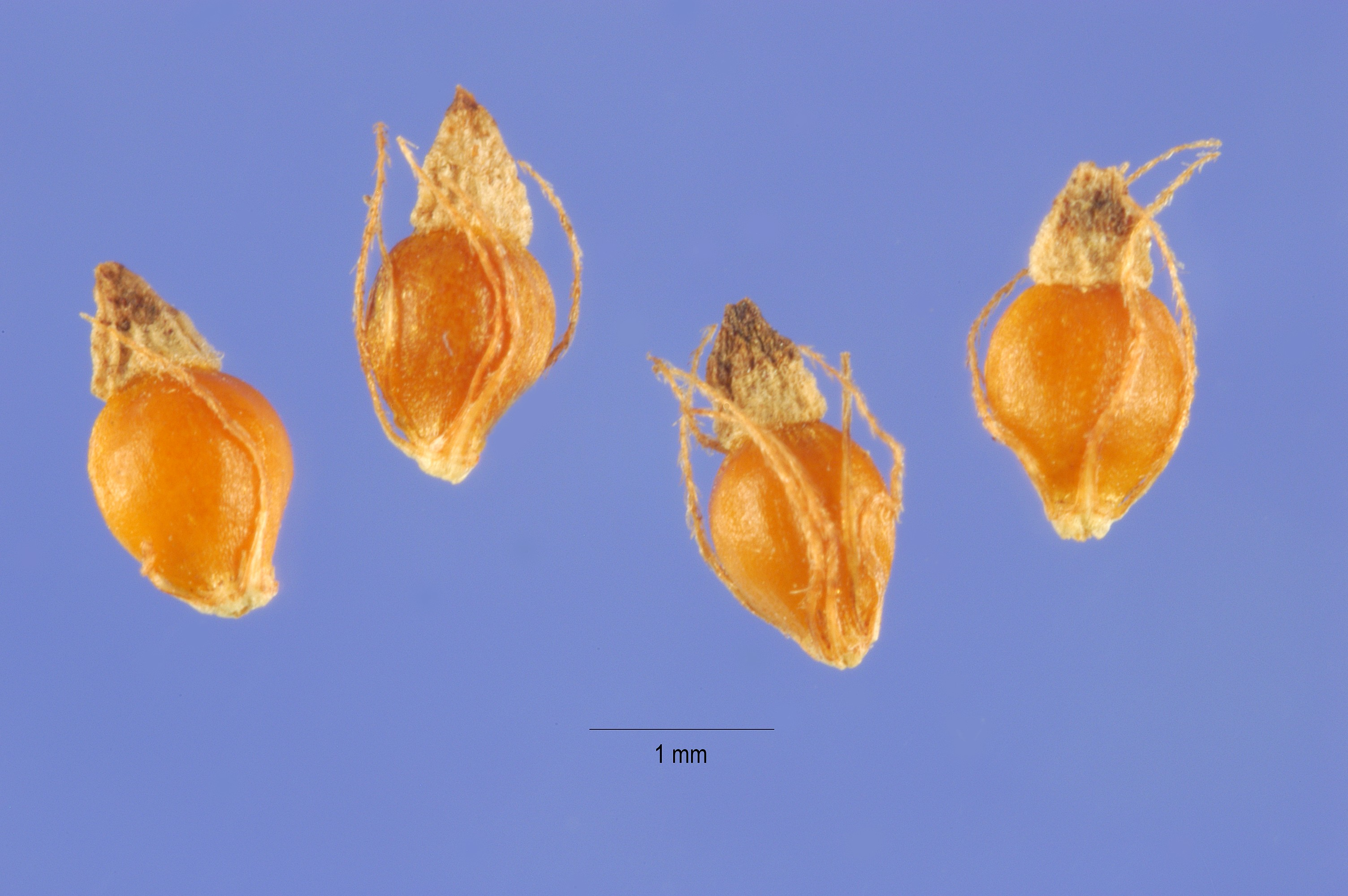 Eleocharis palustris seeds